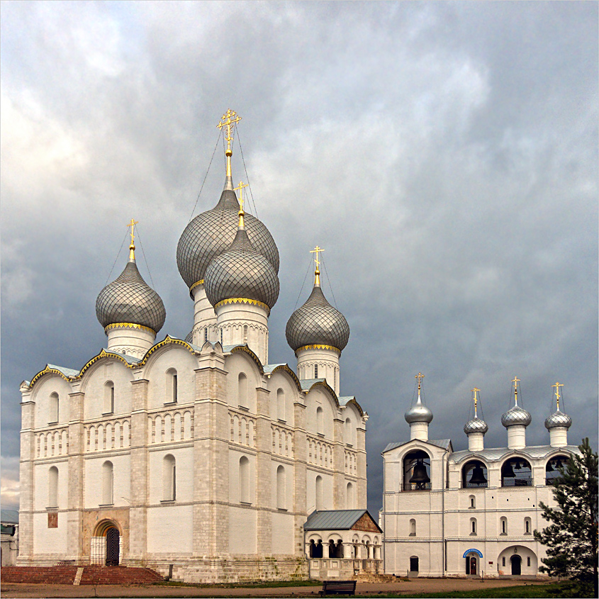 Ансамбль Ростовского Кремля (Ярославская область, Ростов, центр города)